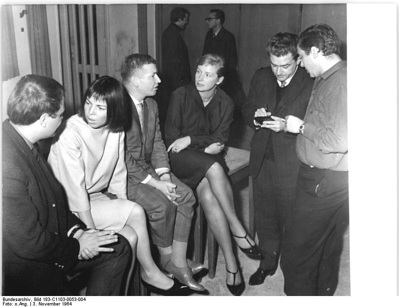 Zentralbild-bpb Mn-Pr 3.11.1964 Lyriker und Schriftsteller aus der DDR im Münchner "Komma-Klub". Zu einer angeregten Diskussion zwischen jungen DDR-Autoren und Gästen des Münchner Komma-Klubs, kam es nach einer Veranstaltungsreihe der Münchner Literarischen Vereinigung. Auf unserem Foto von links: Frieder Hitzer unterhält sich mit Sarah Kirsch; Karl-Heinz Jacobs spricht mit einer der anwesenden Gäste; Armin Müller (mit Notizbuch) während eines Gesprächs mit dem Leiter des Komma-Klubs, Manfred Vosz.